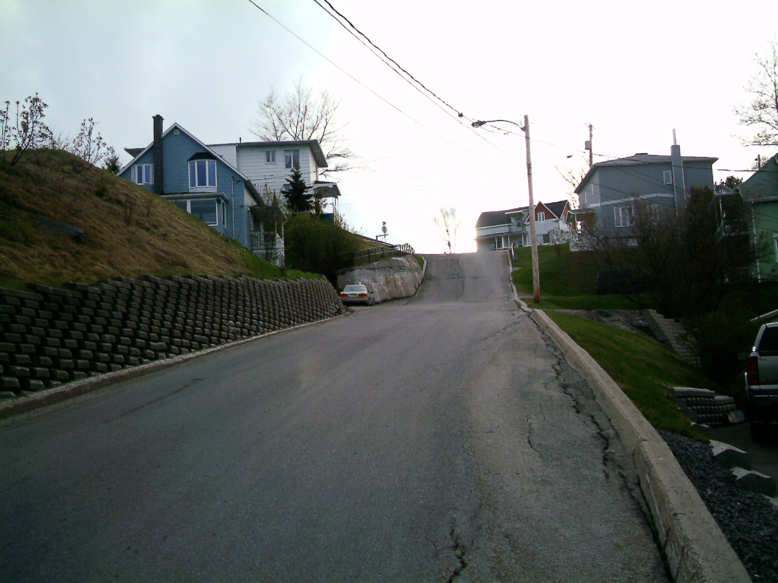 Côte de la rue St-Leon